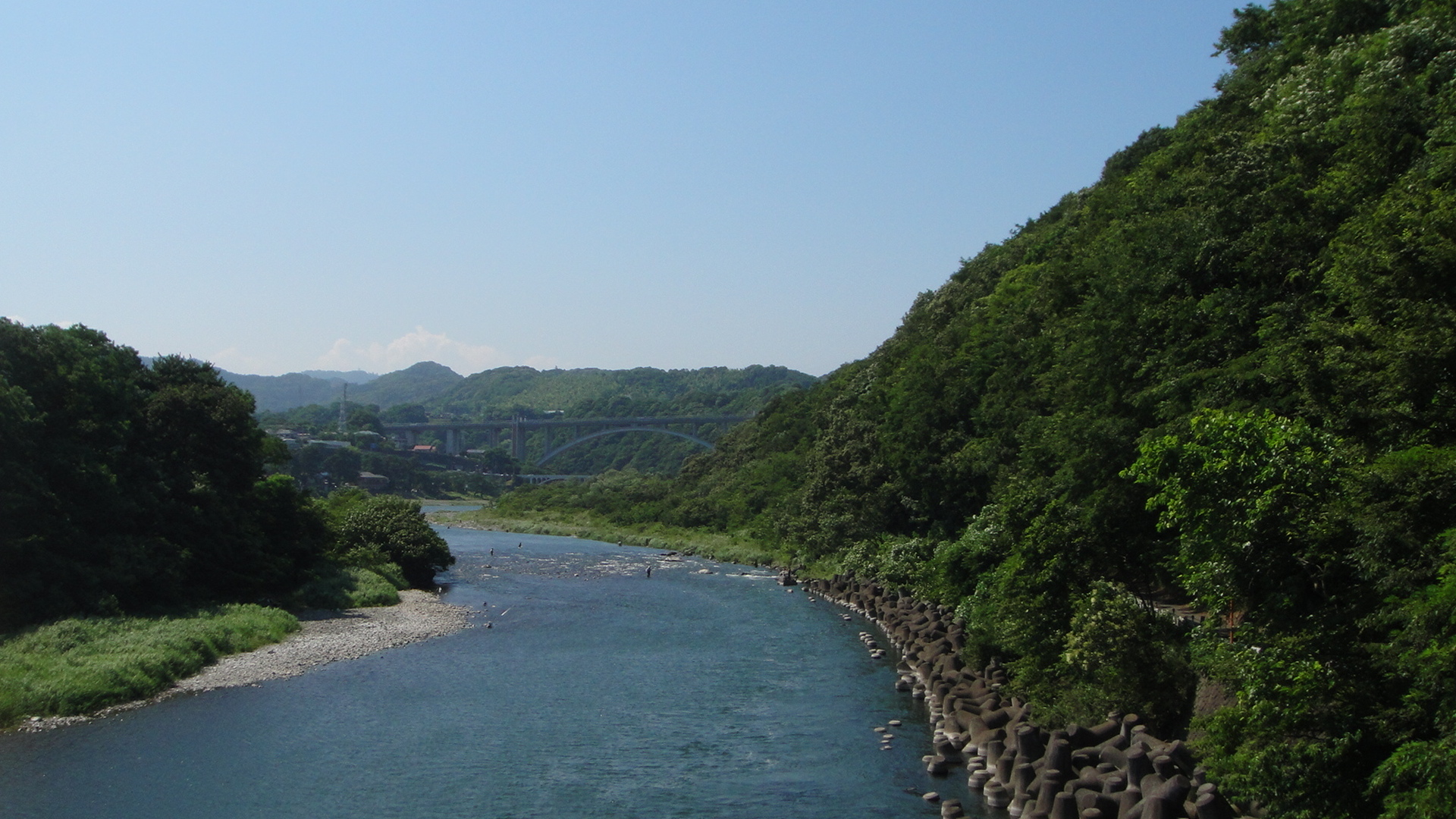 相模川を相模原市緑区大島周辺から上流を望む